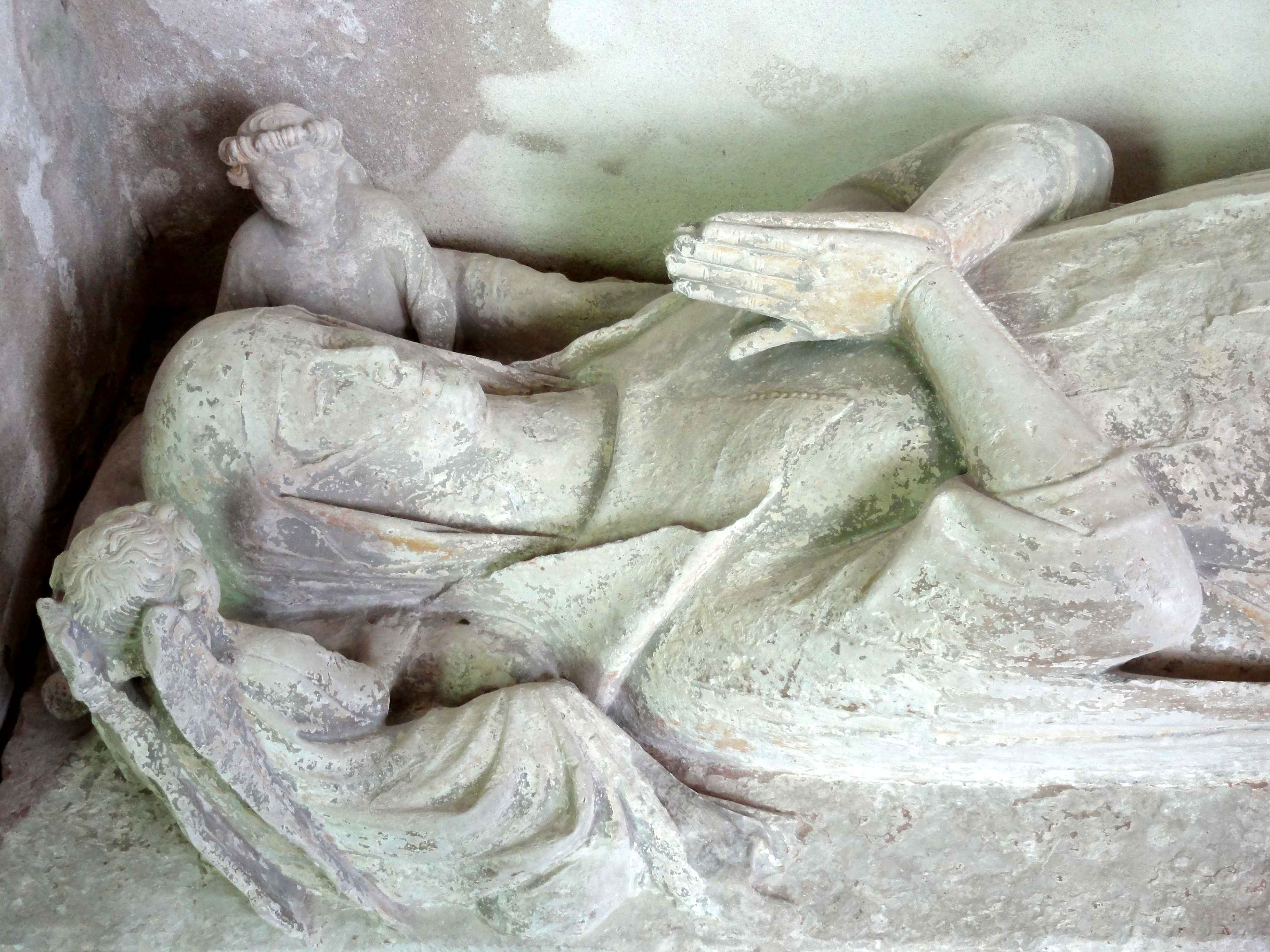 Mobilier de l'église (voir titre).